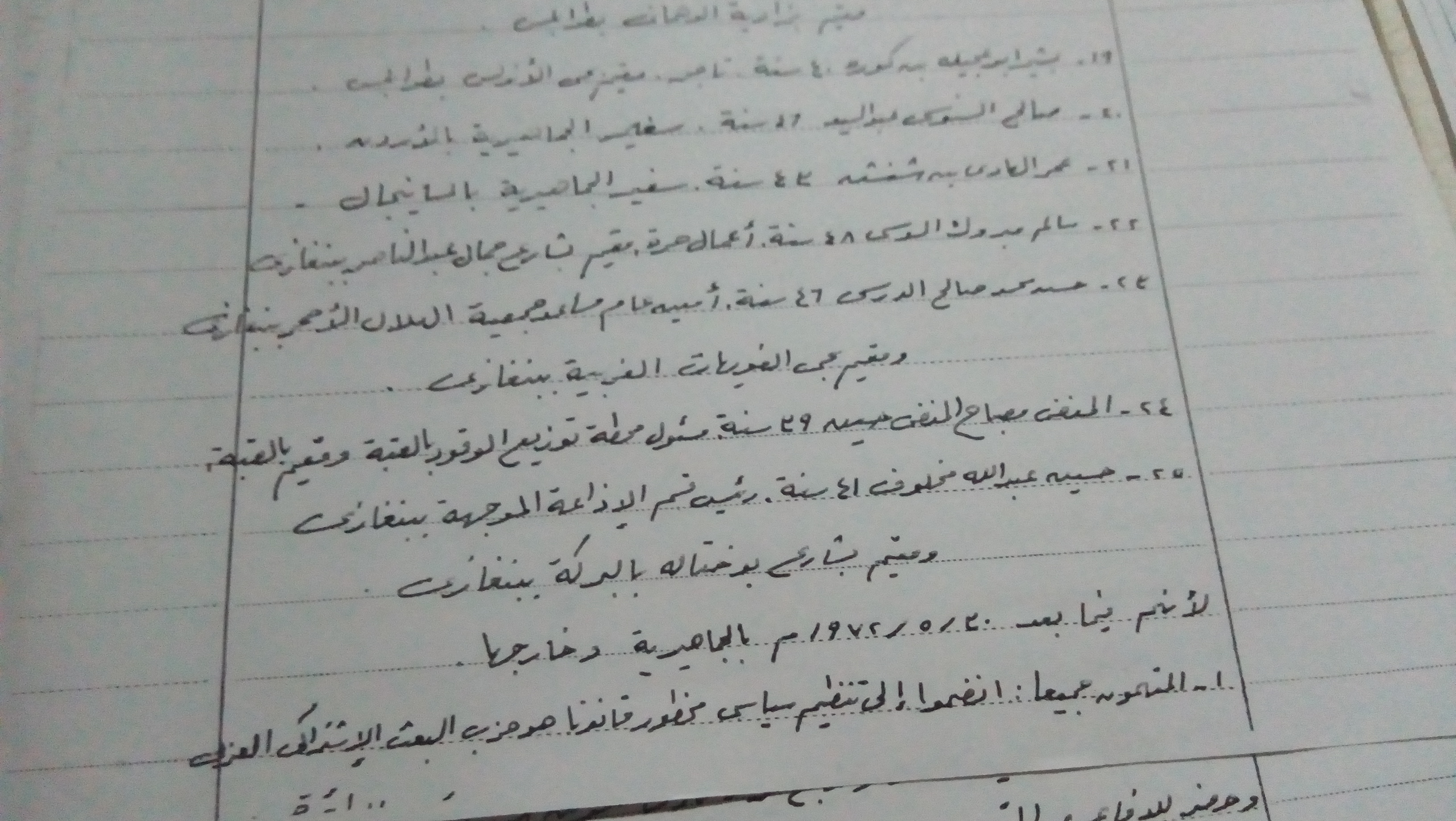 التهم